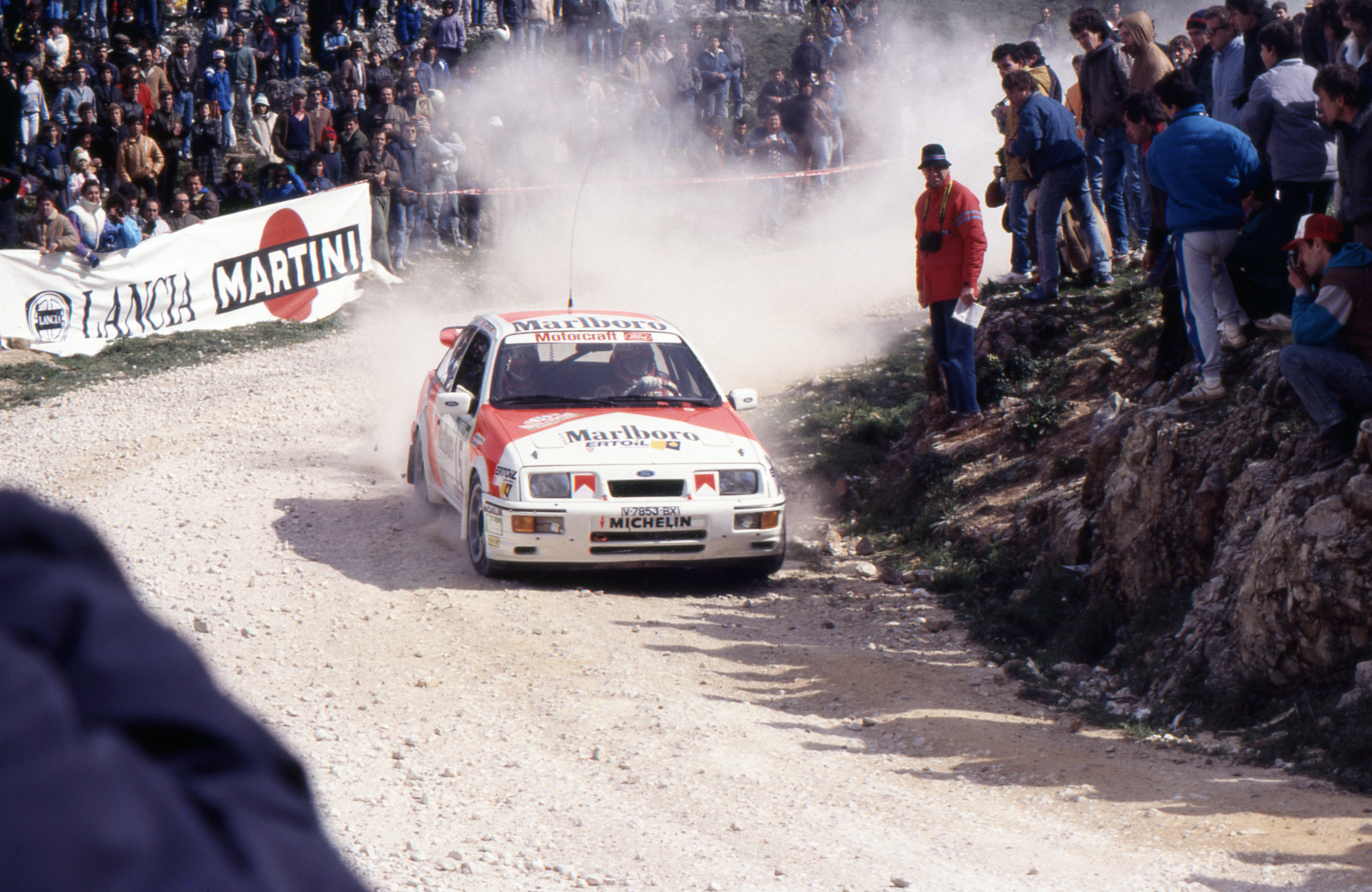 Slide_Agfachrome_Rallye de Portugal_1988_Montejunto_015